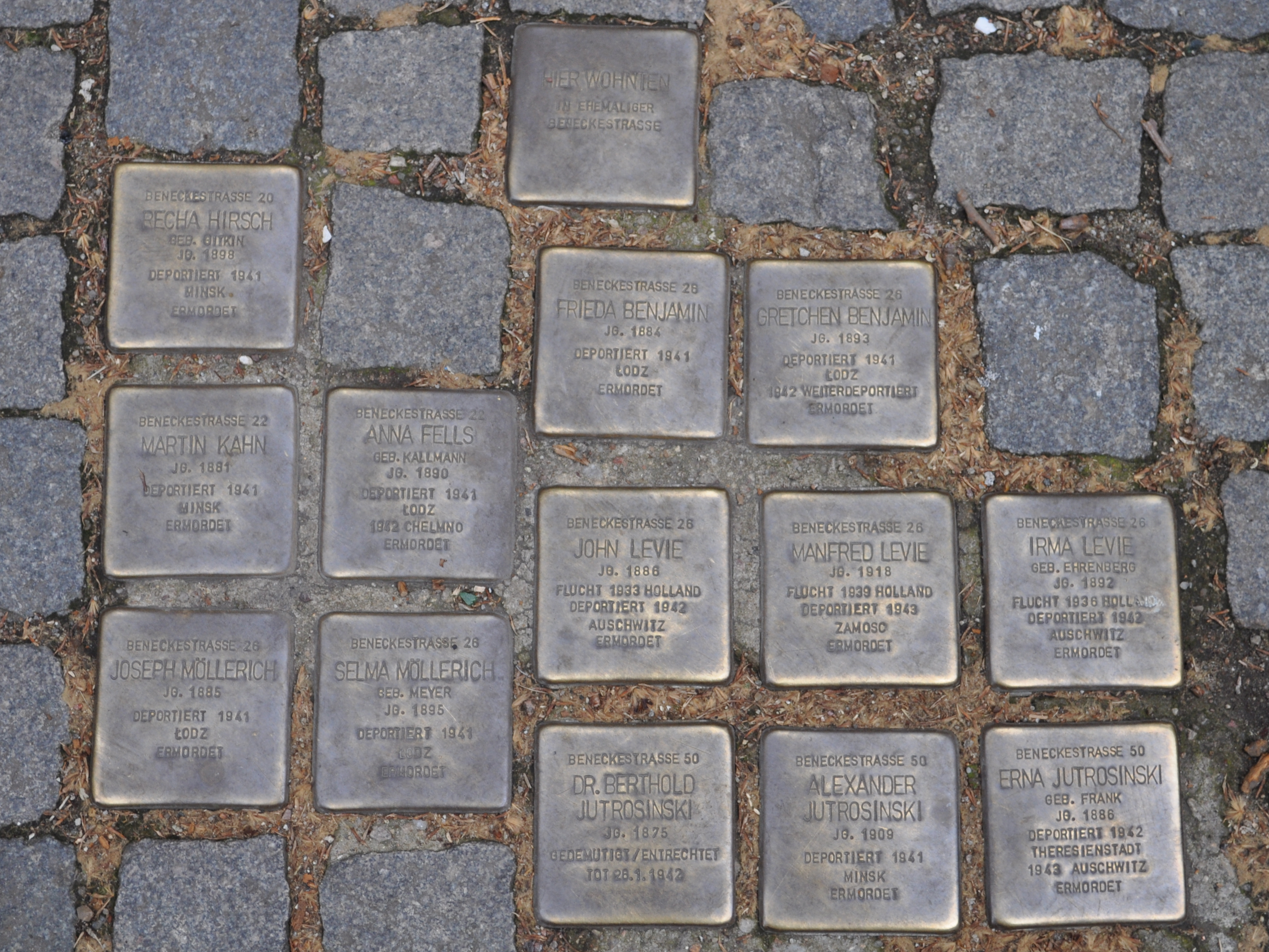 Stolpersteine für Bewohner der ehemaligen Beneckestraße auf dem Campus der Universität Hamburg in Hamburg-Rotherbaum.